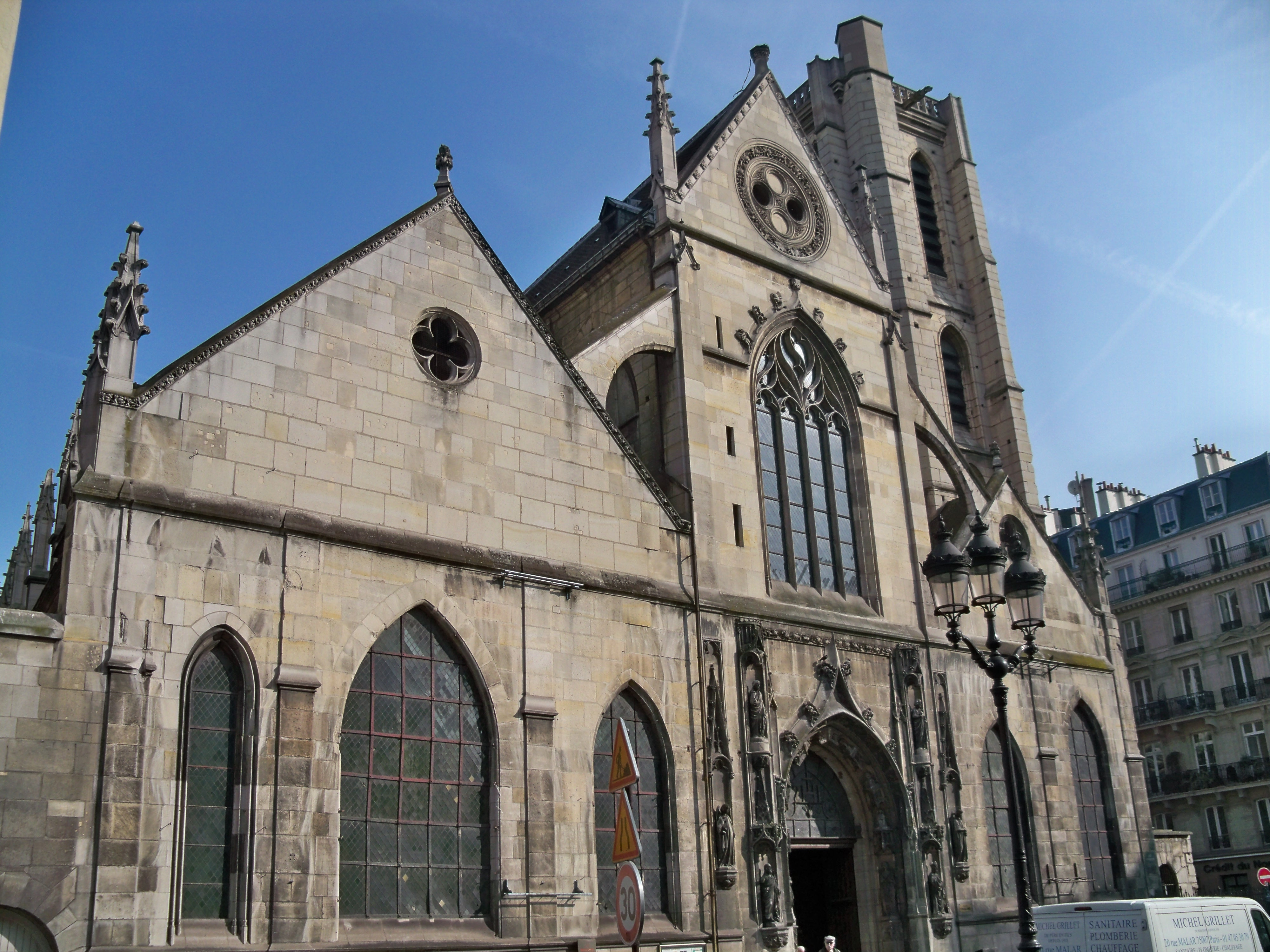 Église Saint-Nicolas-des-Champs (Classé) .